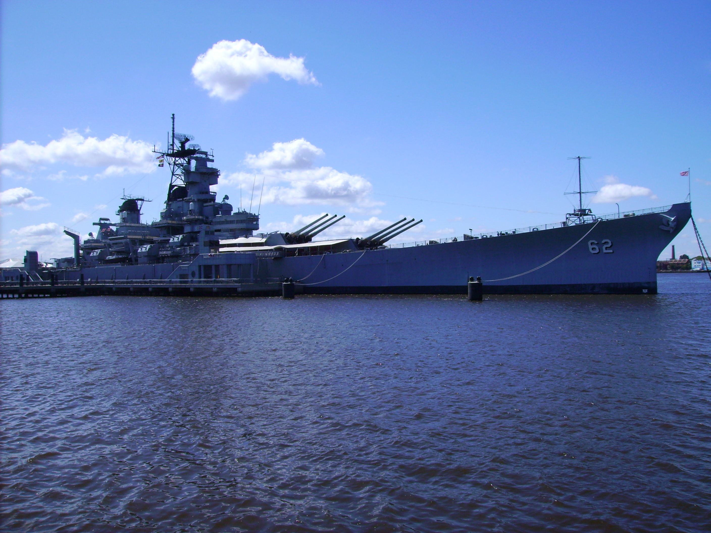 Die USS New Jersey an ihre jetzigen Anlegestelle im Hafen des Delaware River.